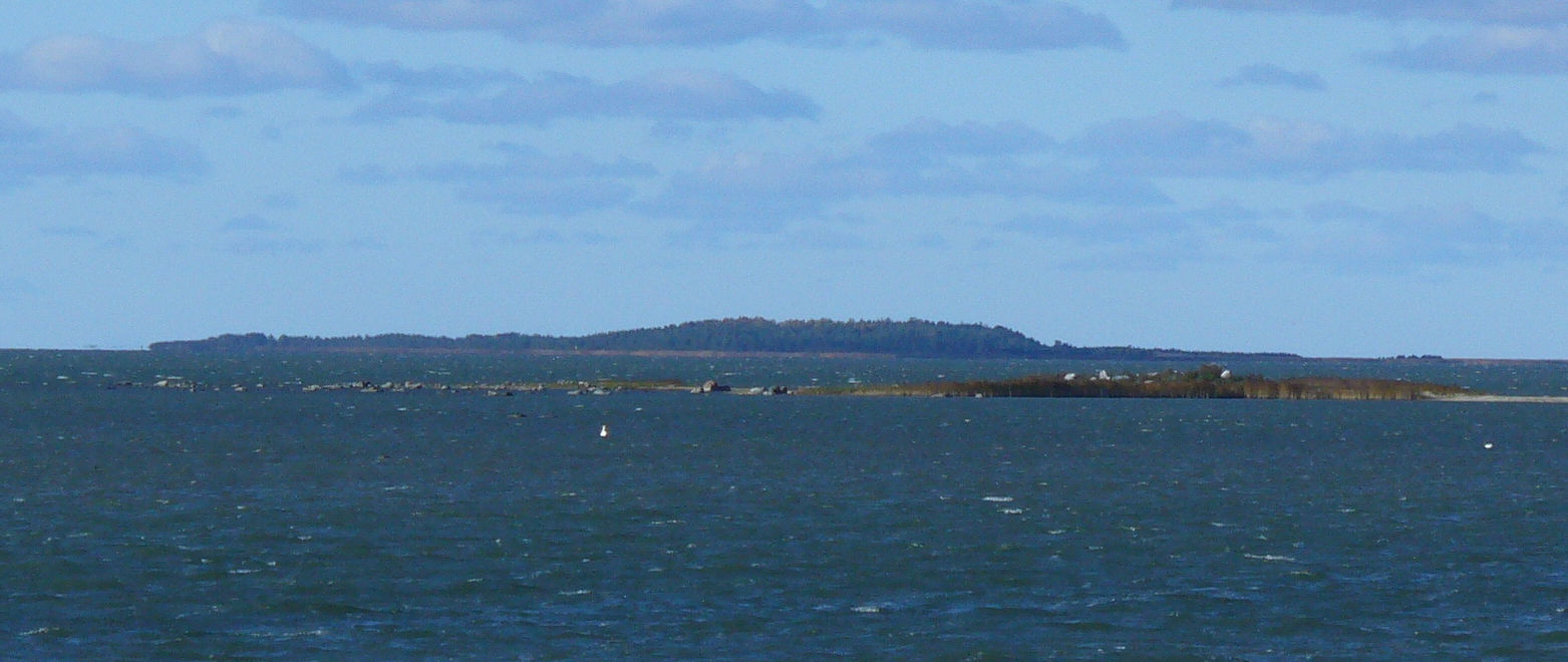 Liialaid tagapool ja Hoorahu eespool. Vaade Puise poolt